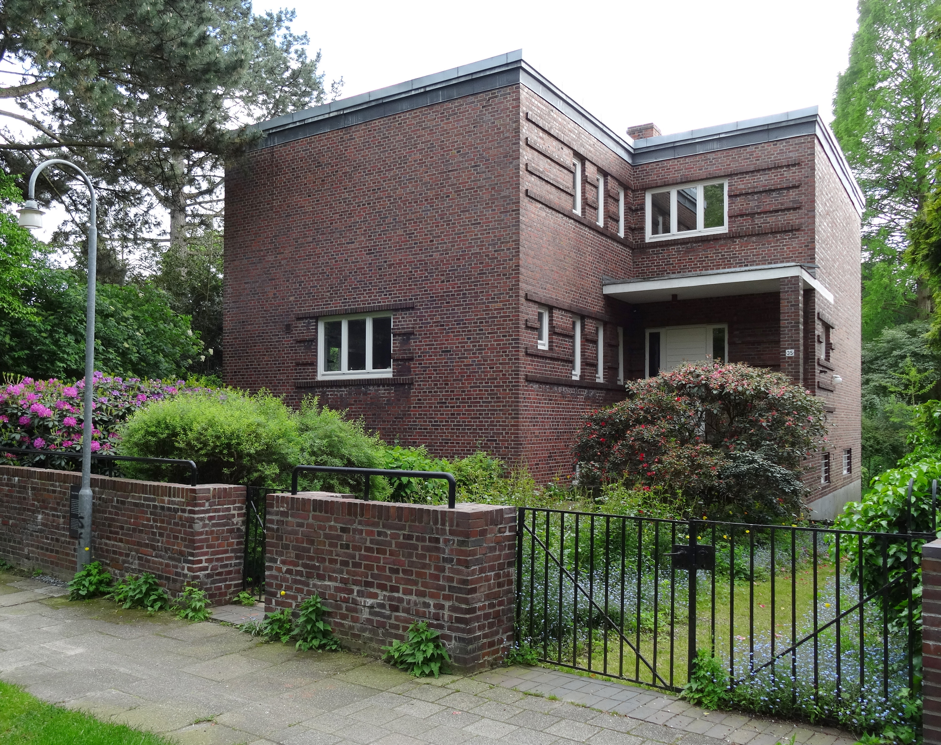 Haus Grohne in Bremen, Friedrich-Mißler-Straße 35Das abgebildete Objekt ist ein geschütztes Kulturdenkmal in der Freien Hansestadt Bremen, mit der Nr. 0422 beim Landesamt für Denkmalpflege registriert.